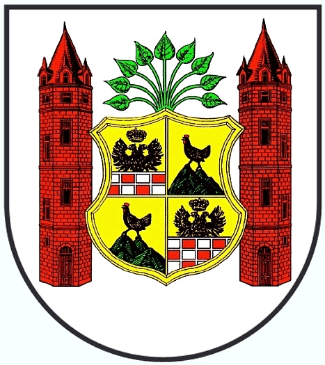 Wappen der Stadt Ilmenau